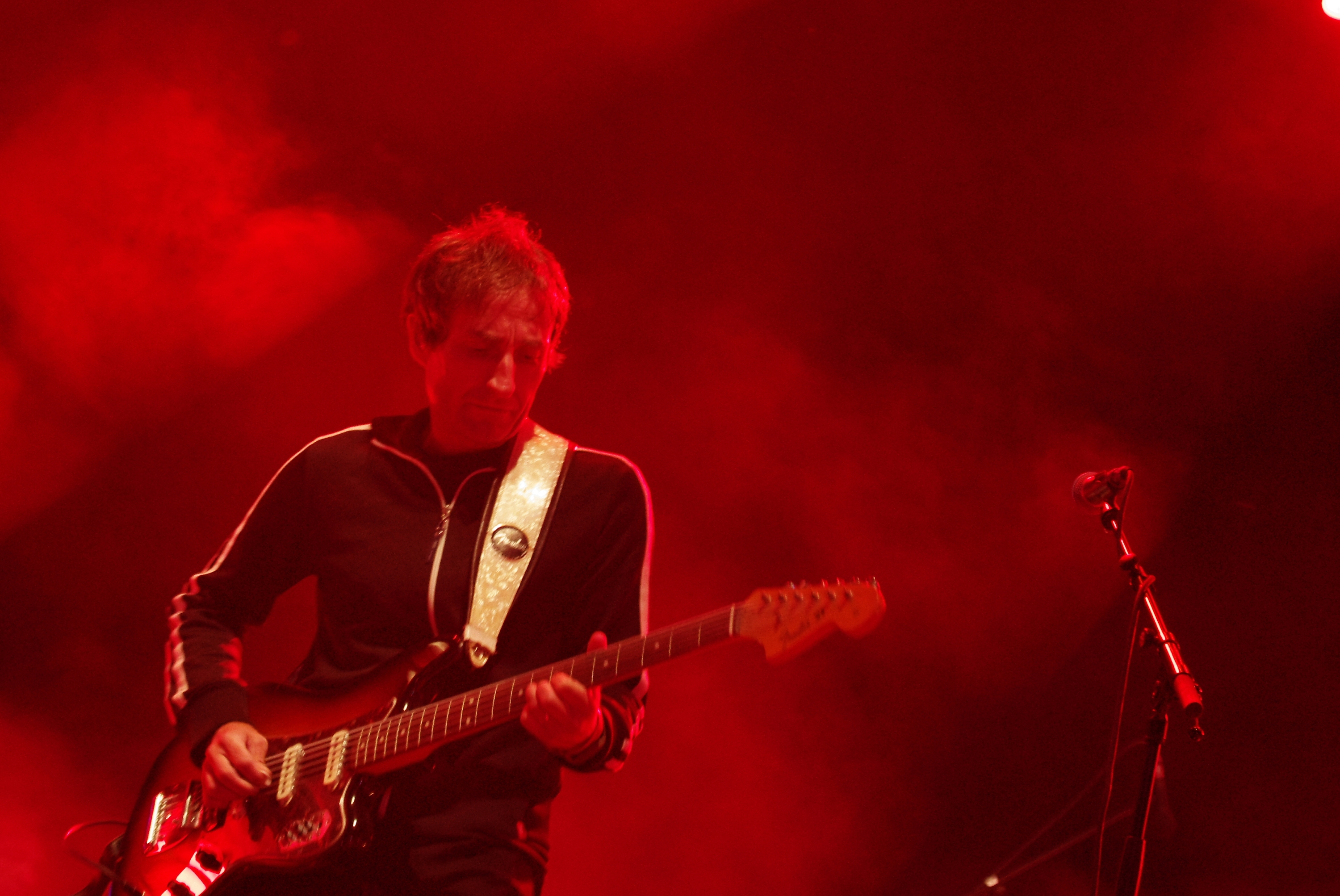 James (band) auf dem Haldern Pop Festival 2013. Hauptbühne. Besetzung: Tim Booth (Gesang) Jim Glennie (Bass) Larry Gott (Gitarre) Saul Davies (Gitarre, Violine, Percussion) Mark Hunter (Keyboards) Dave Baynton-Power (Schlagzeug) Andy Diagram (Trompete, Percussion)